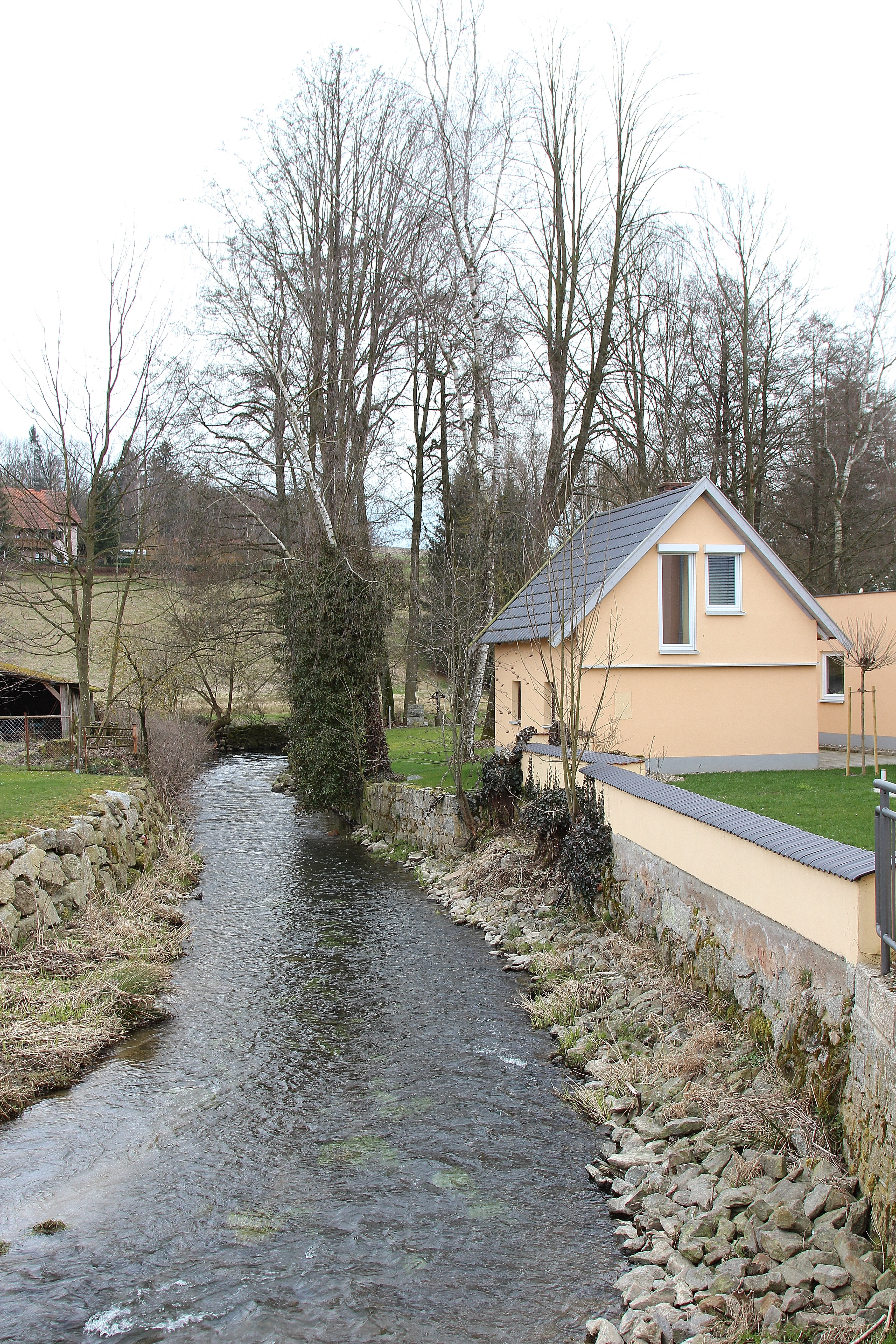 Kaimling, Fluss Luhe; Stadt Vohenstrauß, Landkreis Neustadt an der Waldnaab, Oberpfalz, Bayern